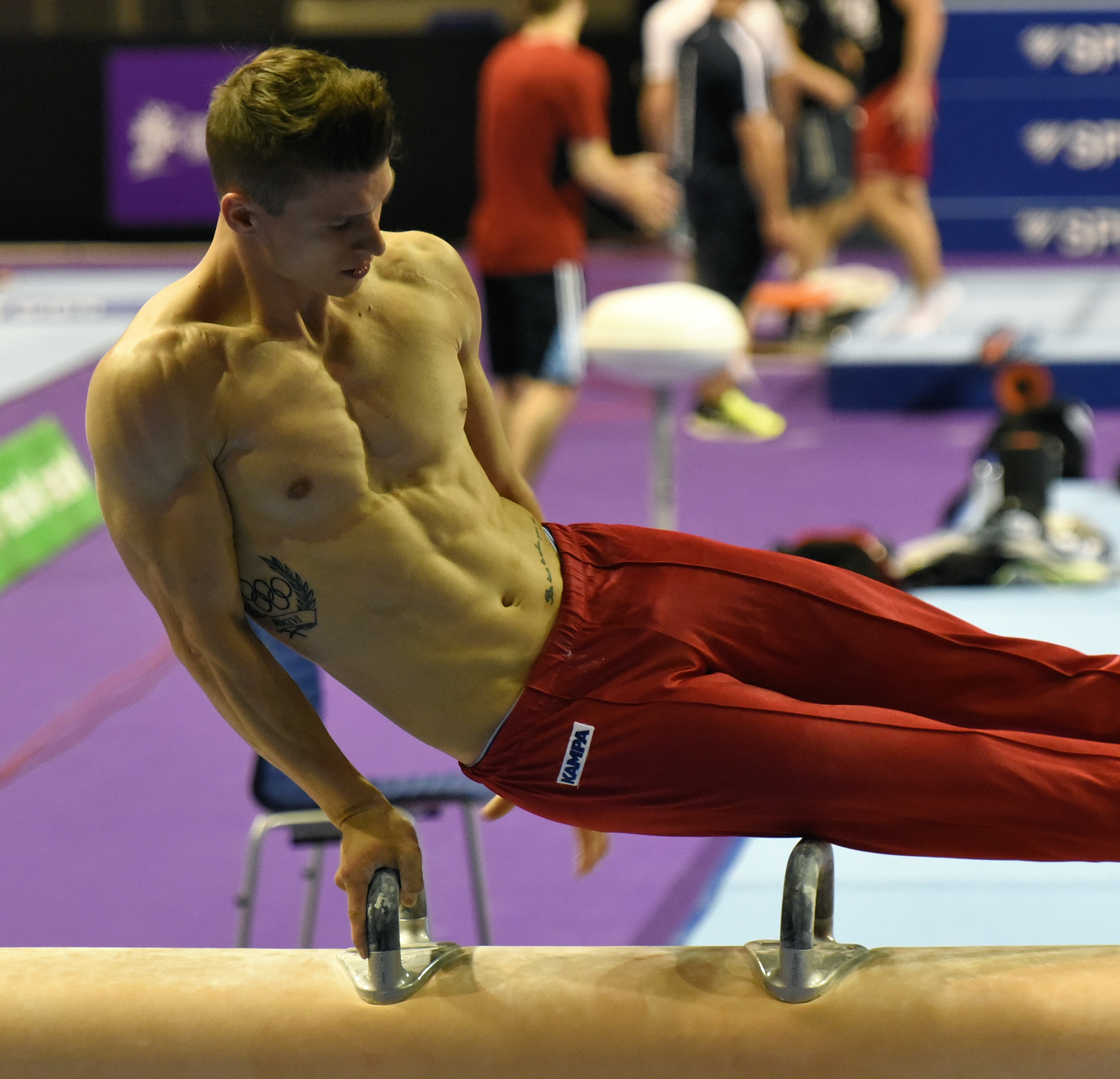 Deutsche Meisterschaften Gerätturnen männlich Training beim Internationalen Deutschen Turnfest Berlin 2017. Abgebildet: Lukas Dauser.